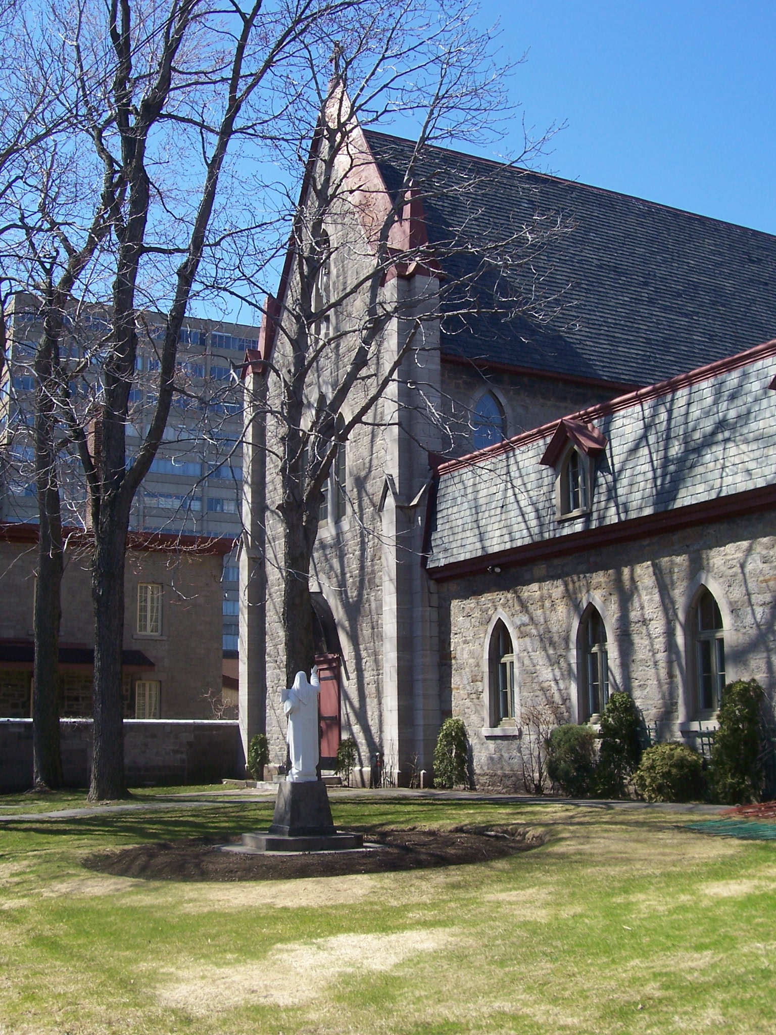 Photo de la chapelle du Carmel de Montréal